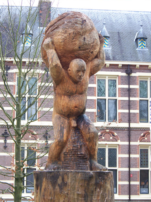 Sisyphus (2008) door Gert Sennema, aan de Brink in Assen